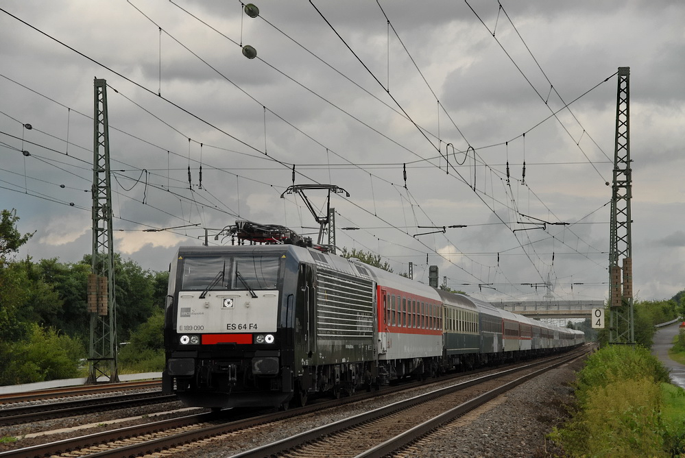 189 090 in der neuen Firmenfarbe der MRCE-Dispolok